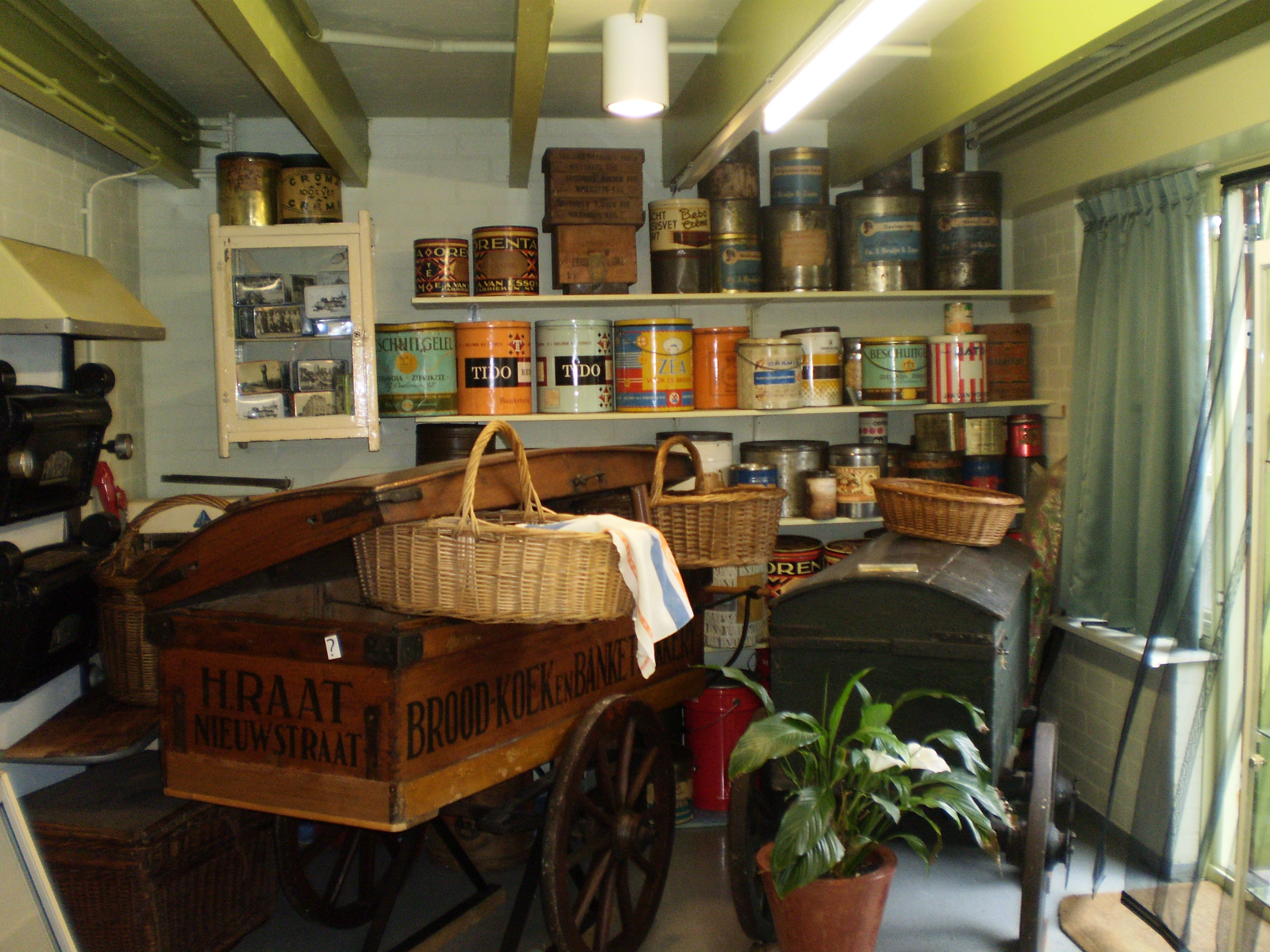 Bakkerskarre en bewarblikken bie Bakkerijmuseum De Alde Bakkerij.